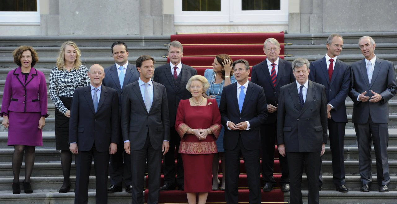 De bordesscene bij het aantreden van het kabinet Rutte, 14 oktober 2010